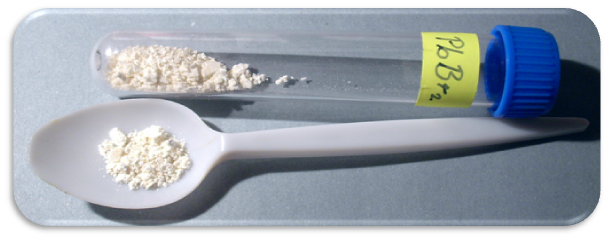 Bromid olovnatý - PbBr2